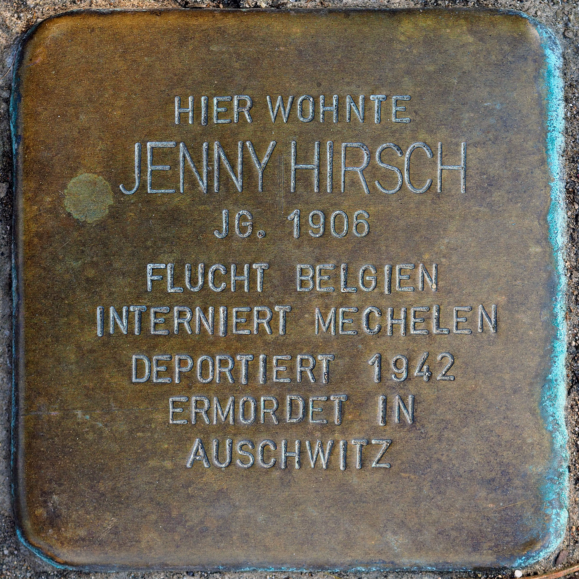 Stolpersteine GV: Hirsch, Jenny